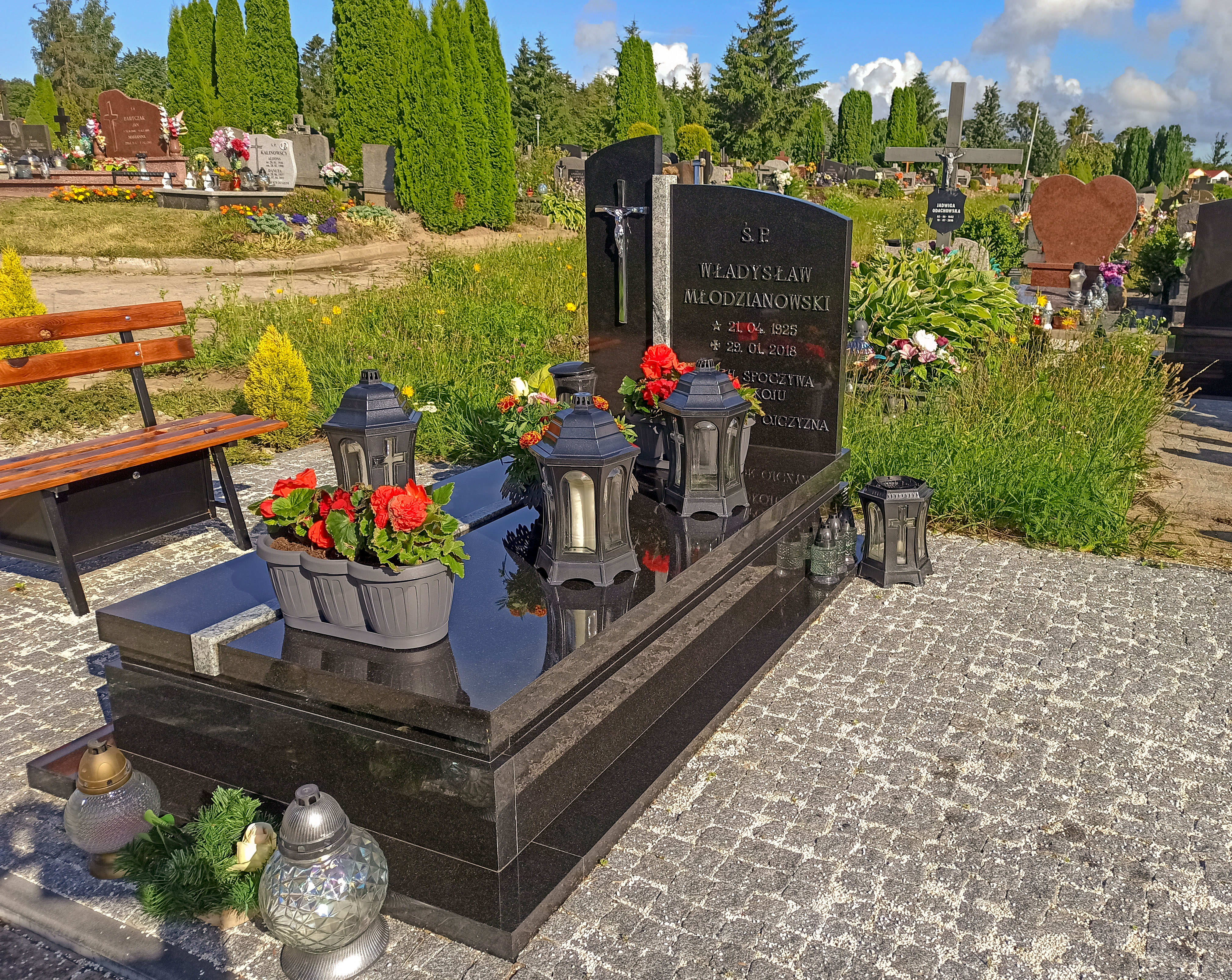 Braniewo Władysław Młodzianowski grób 2020